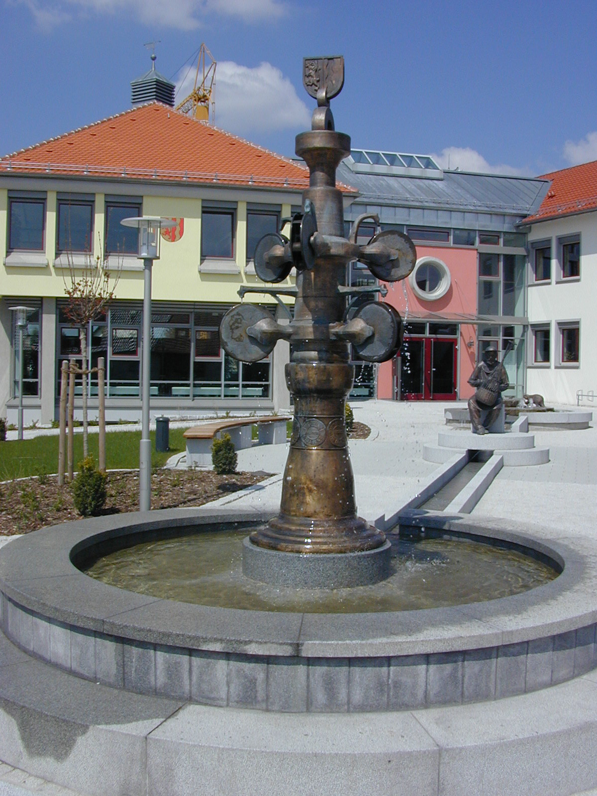 Brunnen vor dem Rathaus in Dettingen an der Iller von Bildhauer Josef Alexander Henselmann